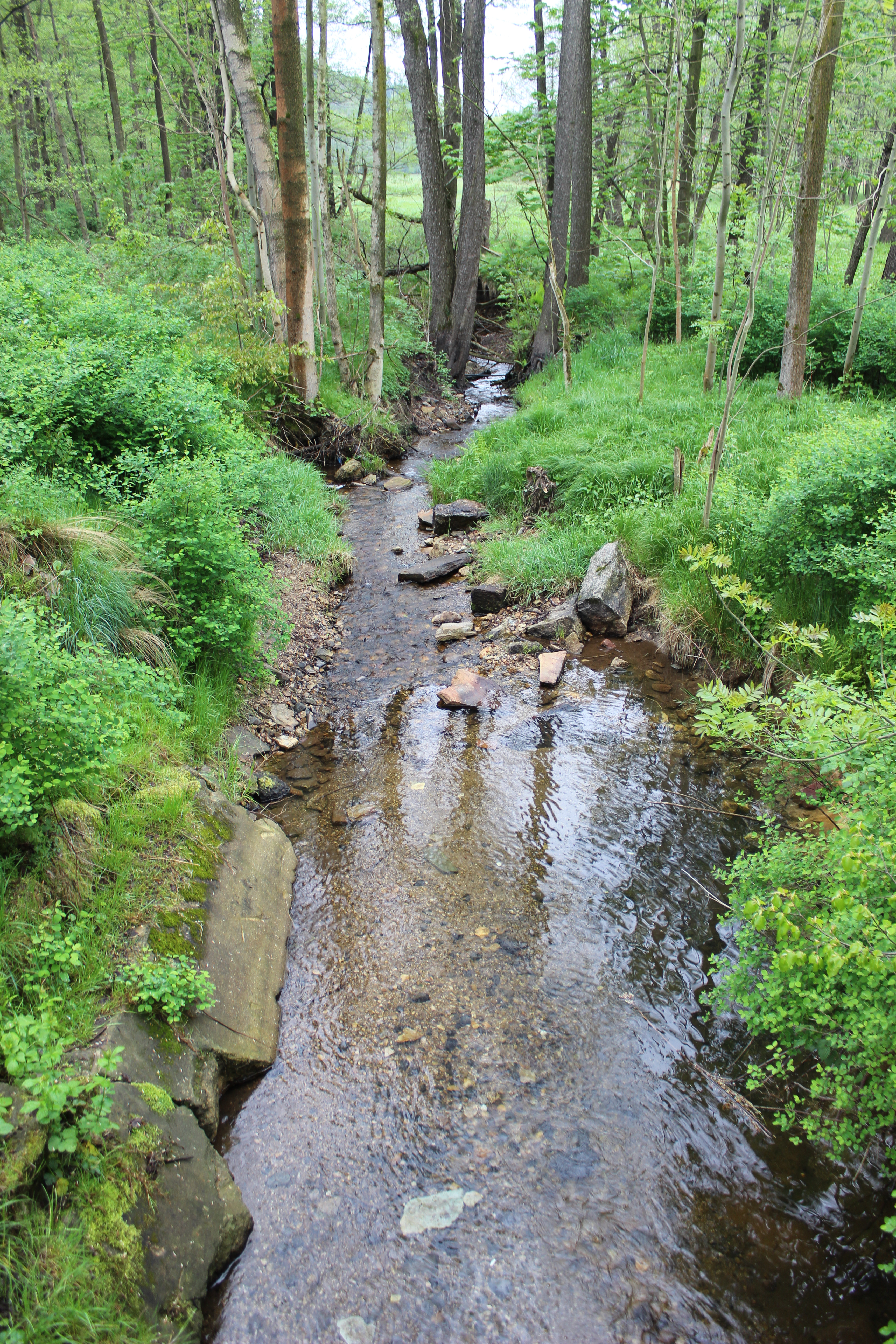 Pekelský potok v Pekle, části Raspenavy.